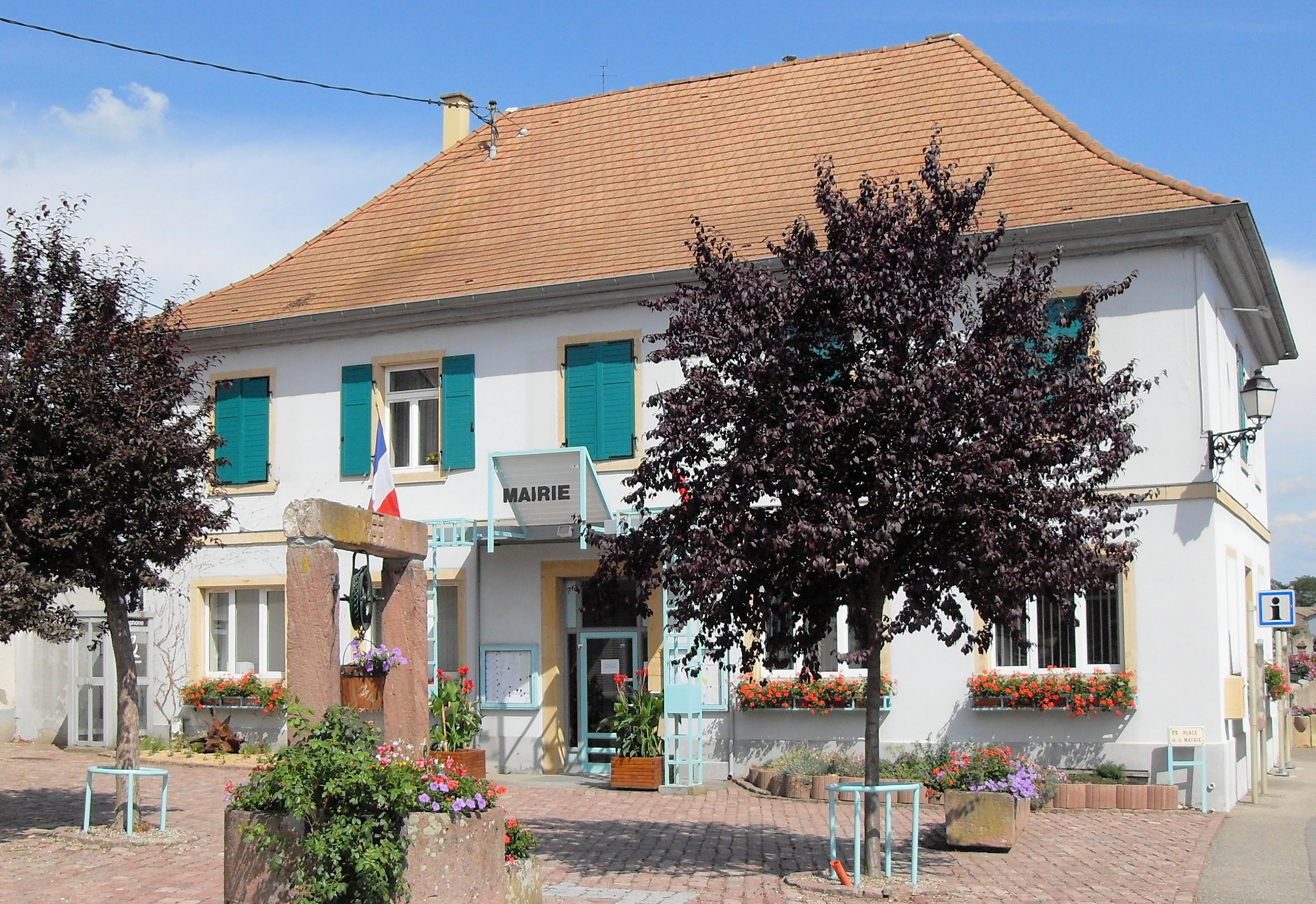 La mairie de Niederhergheim